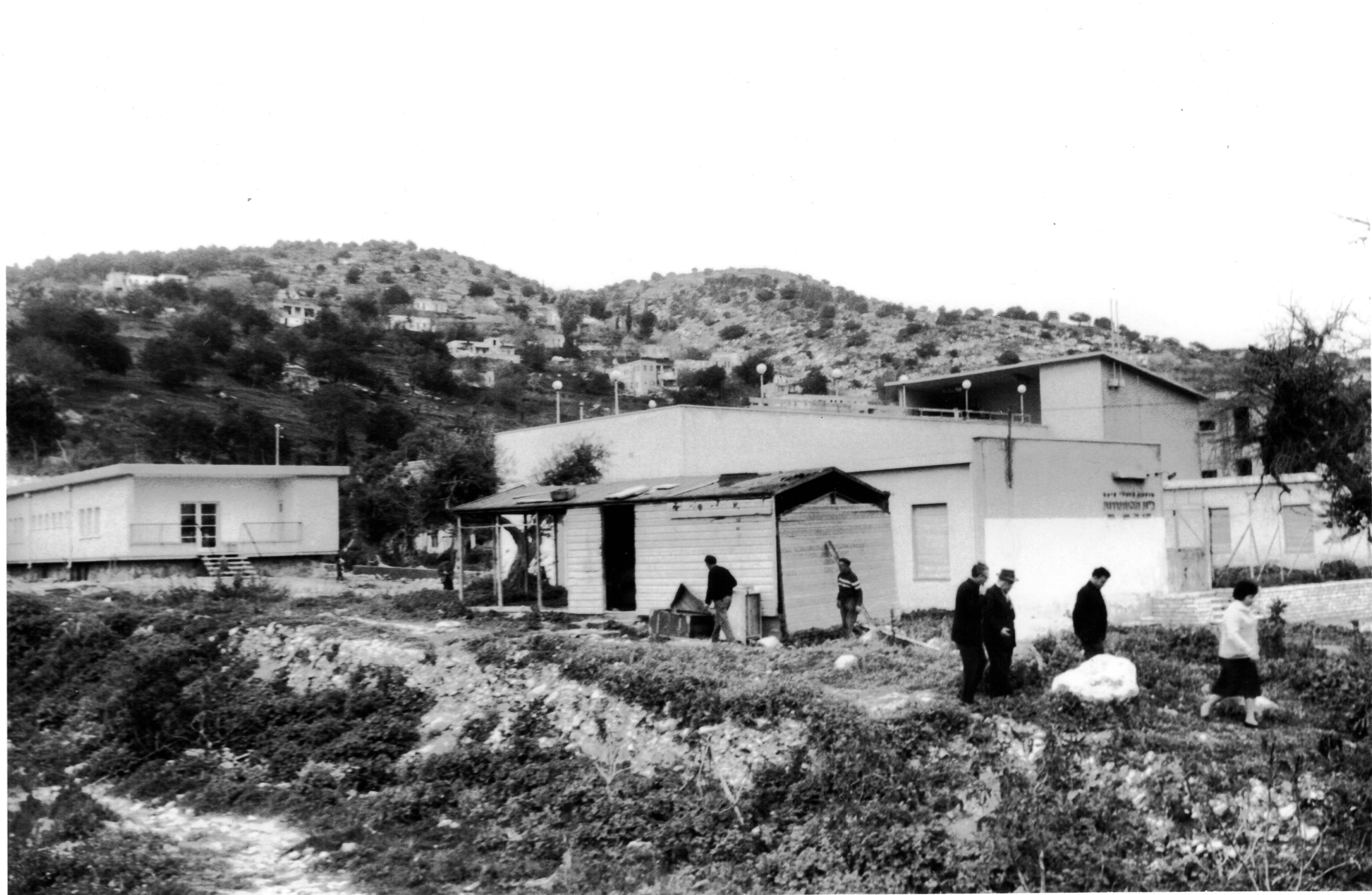 .הריסת הצריף האחרון במעברת תל חנן מארכיון עיריית נשר